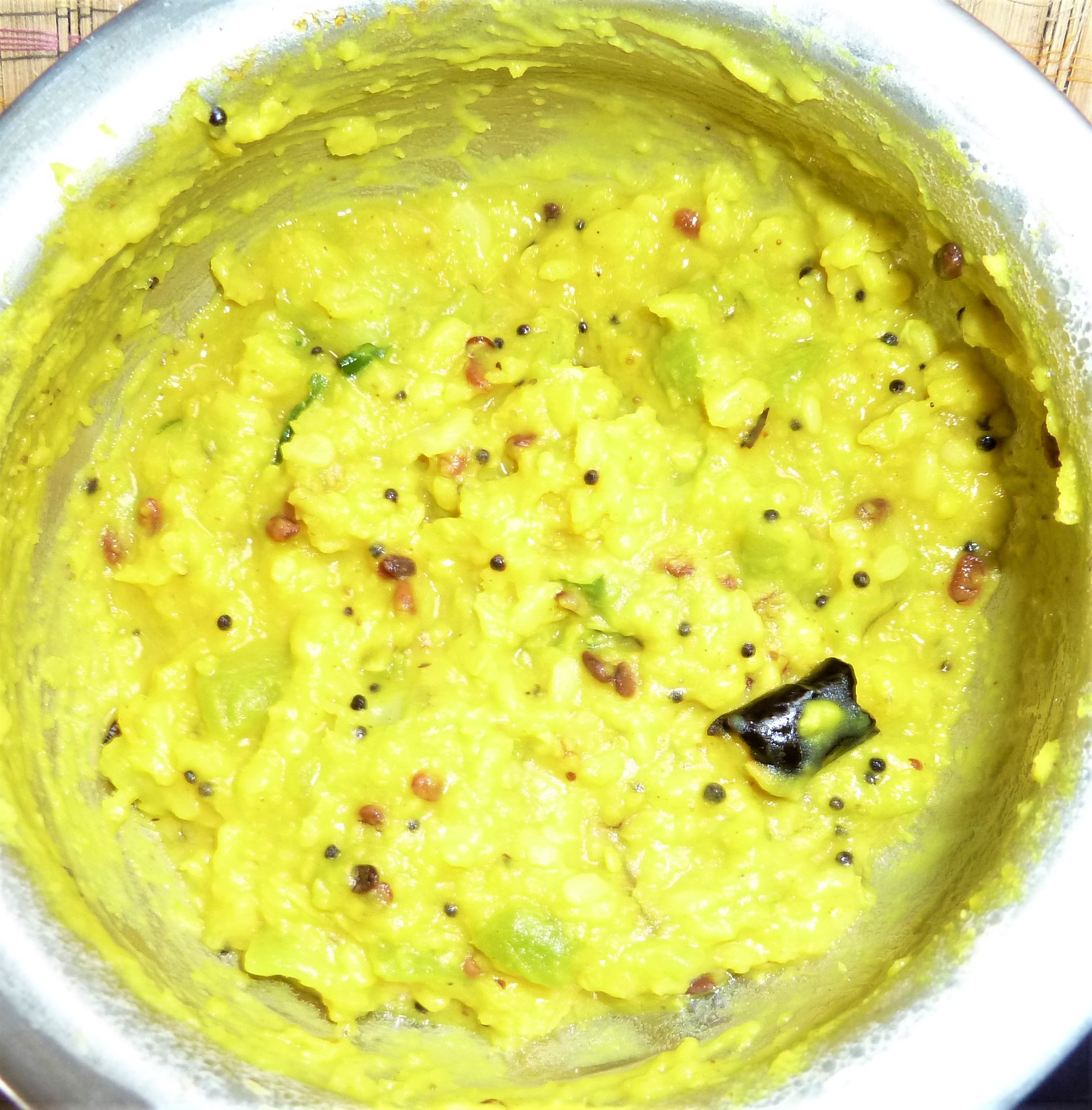 బీరకాయ పప్పు